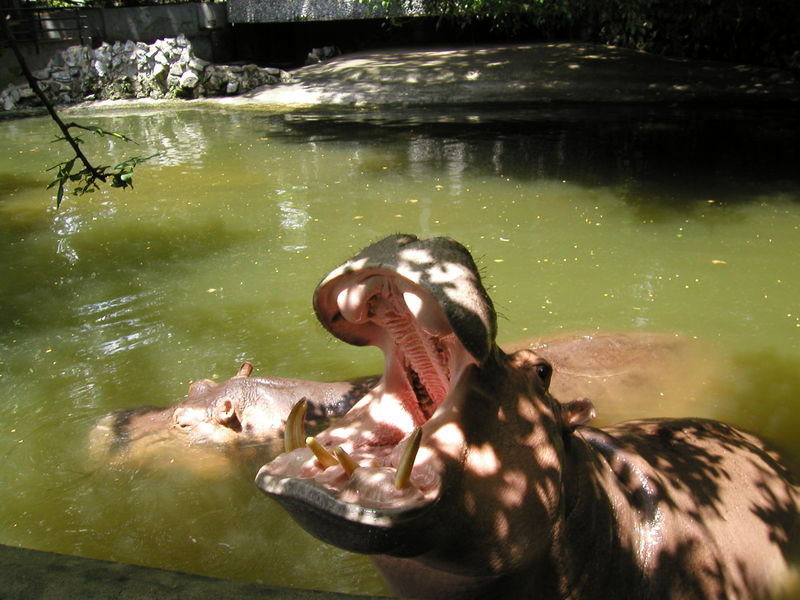 סוס יאור שקלטה מצלמתי